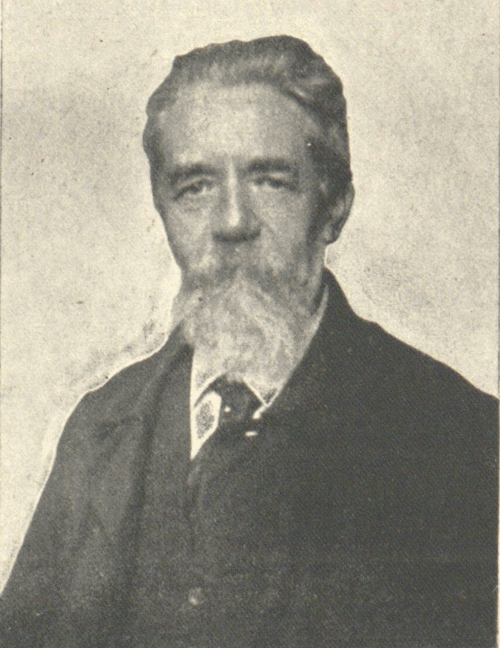 Friedrich Becke (1855–1931), Austrian mineralogist